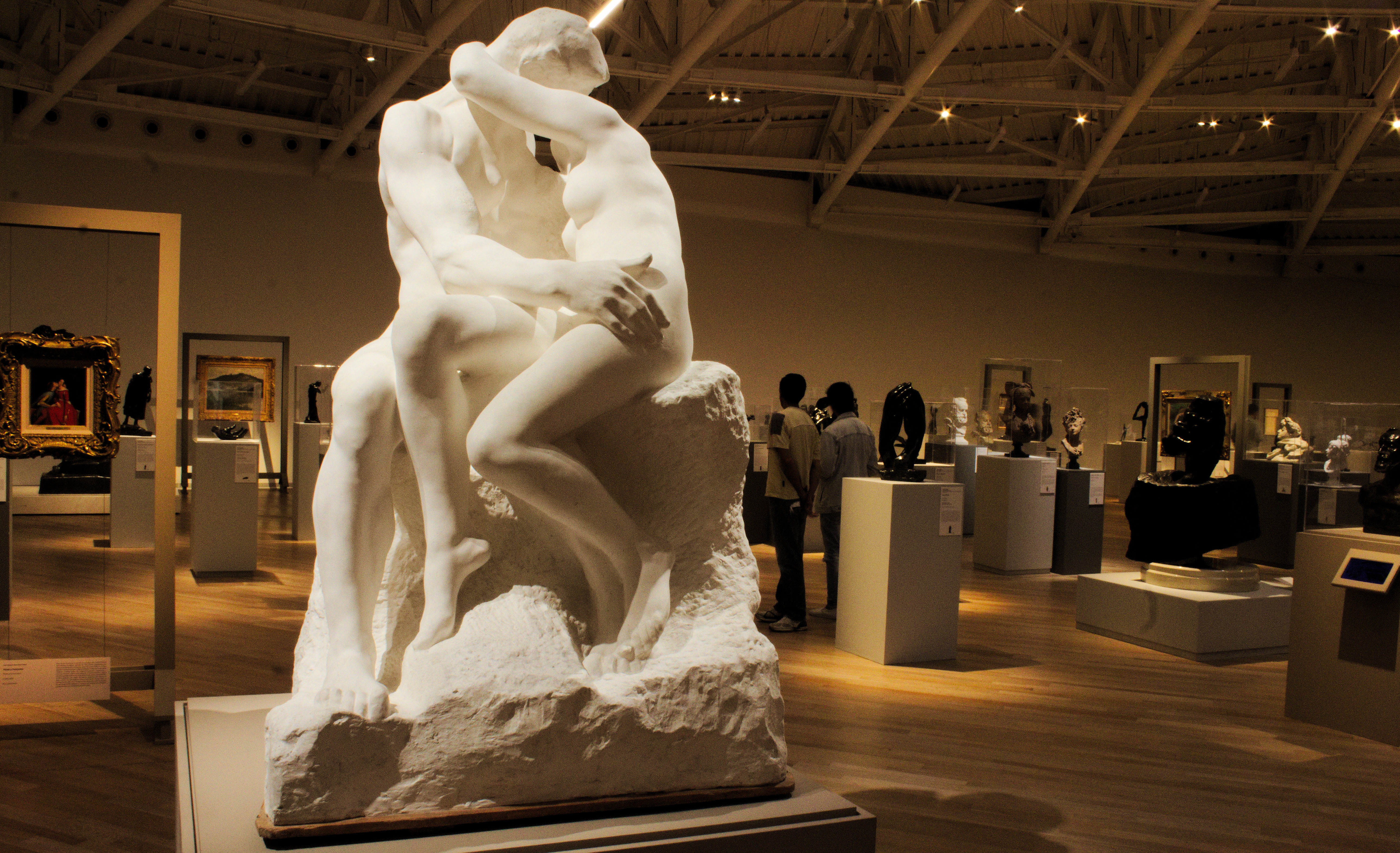 Obra "El beso" de Auguste Rodin.